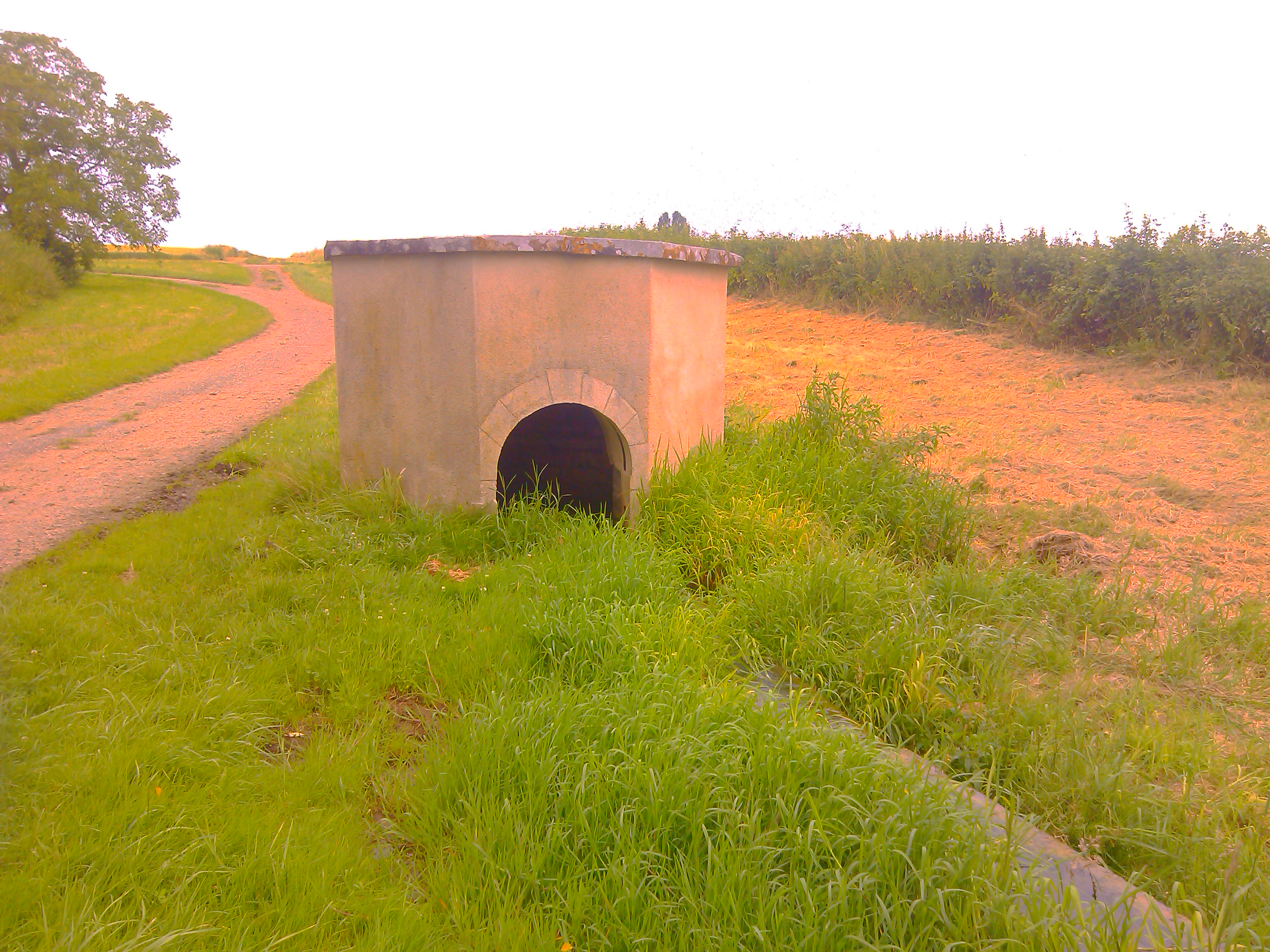 Source à Rosey 71